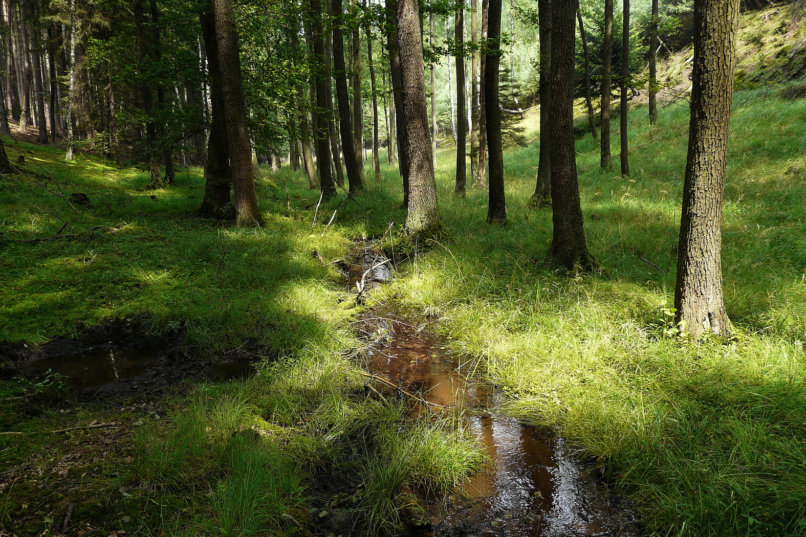 Arnoštický potok v oboře Žehrov